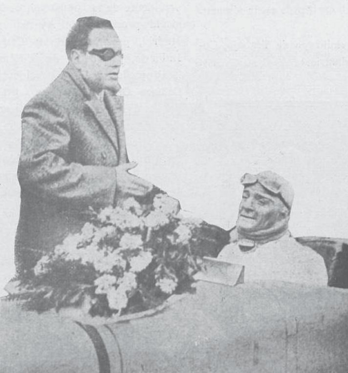 E. A. D. Elridge, hace su primera salida apareciendo en el Autódromo de Montlhery y obsequia y felicita a Benoist después de su gran triunfo